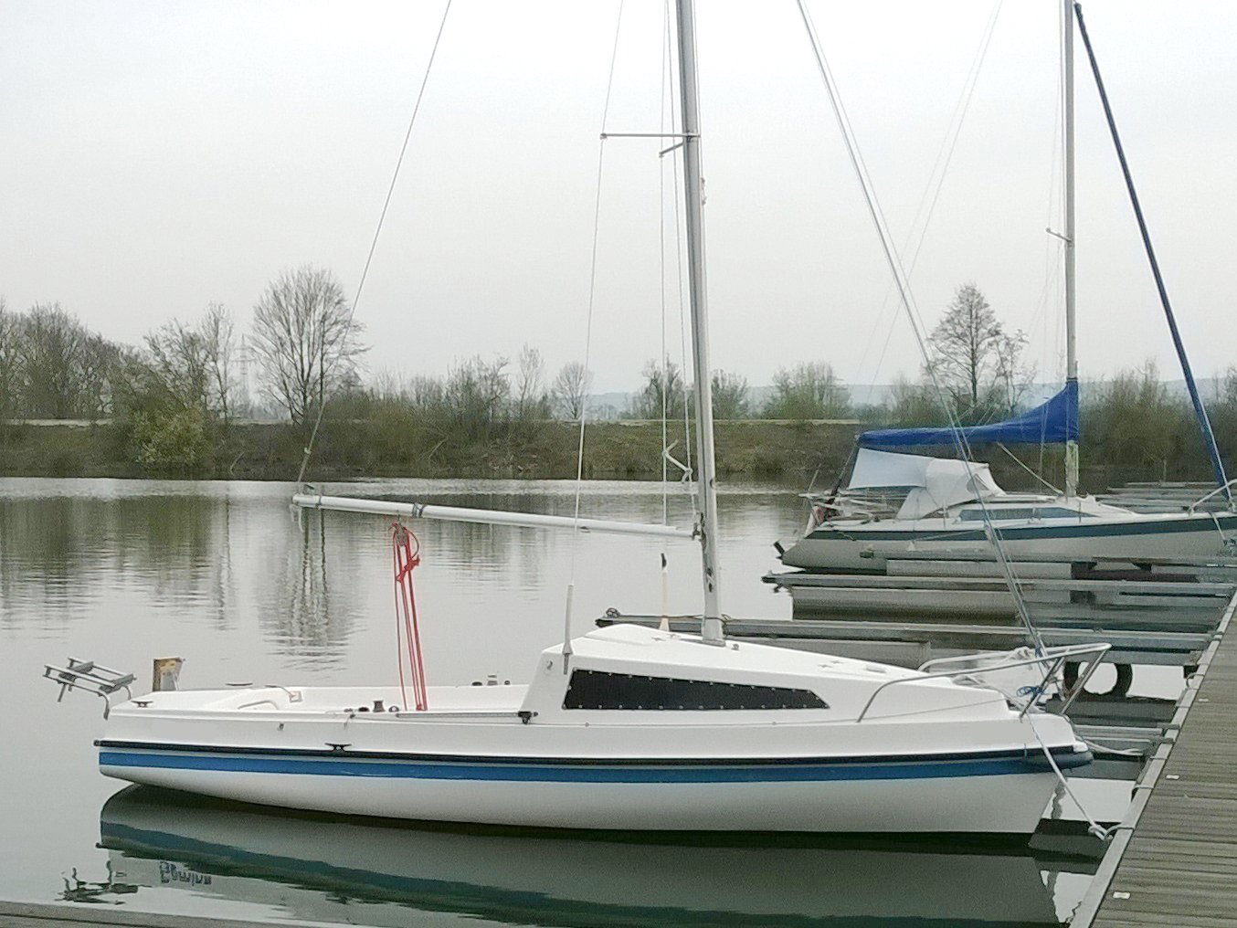 Kim Jollenkreuzer Typ AR - Baujahr 1987, Seriennummer 878, Segelnummer G 458, Hersteller: Kim Boote GmbH Saarbrücken/Düsseldorf